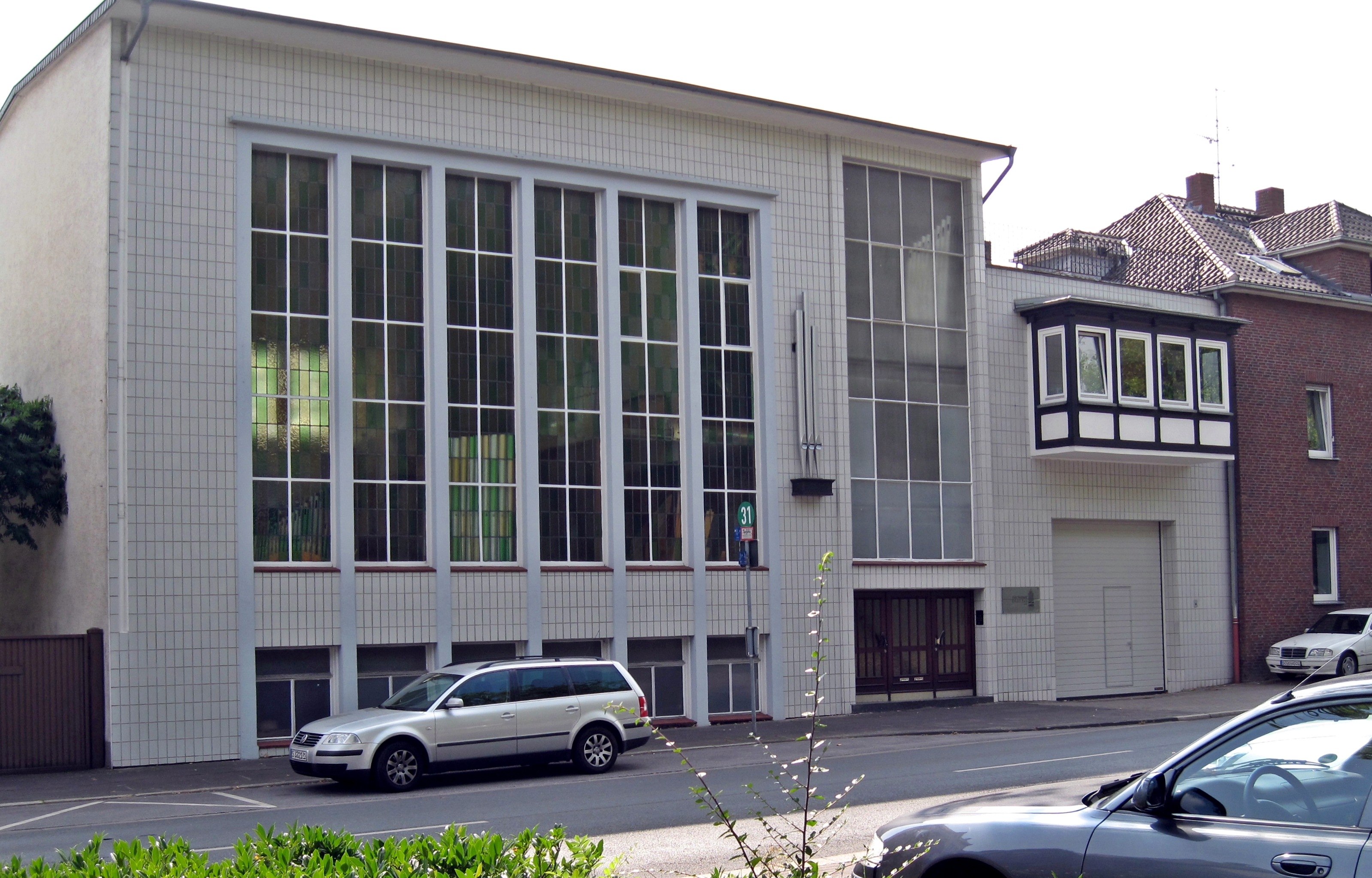 Orgelbau Gebr. Stockmann in Werl.